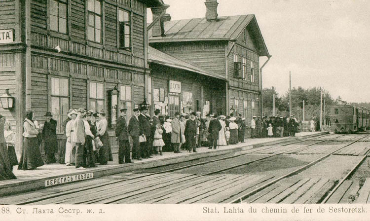 Железнодорожная станция Лахта в 1900х годах